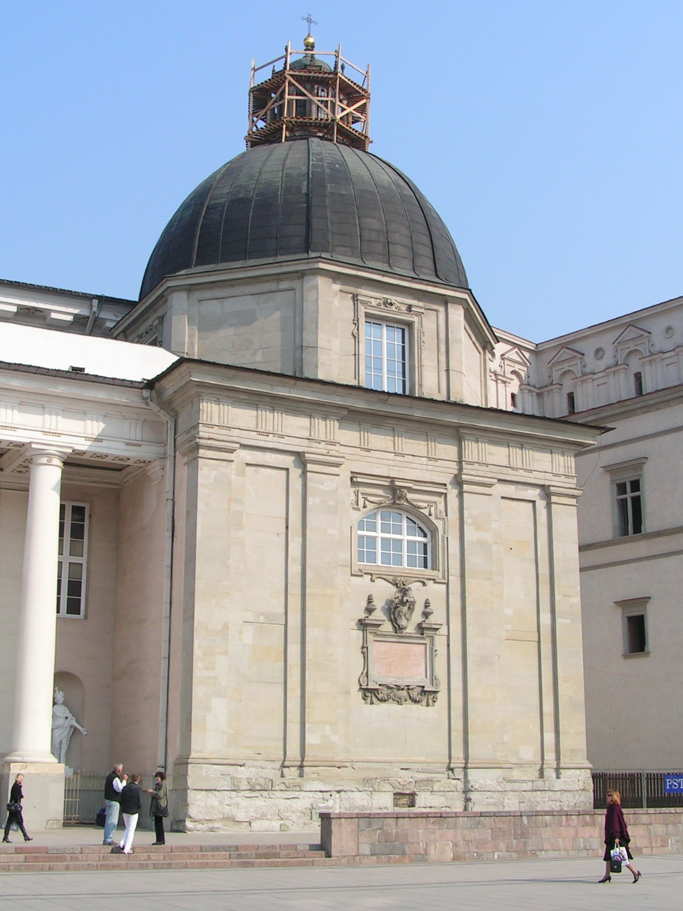 Kaplica św. Kazimierza przy katedrze w Wilnie, St. Casimir's Chapel, Vilnius